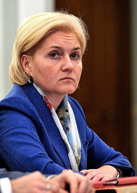 Вице-премьер РФ Ольга Голодец на совещании о реализации региональных программ модернизации здравоохранения